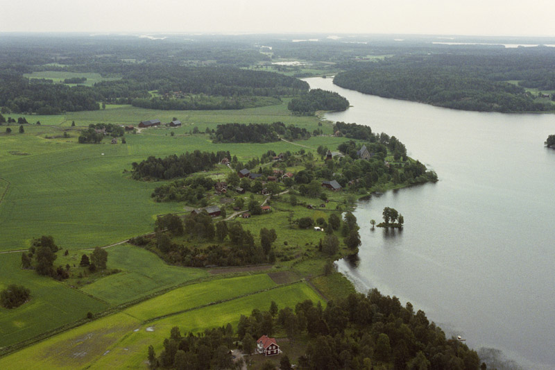 Länna kyrka i bildens mitt, Länna kyrksjö till höger. Fotot från väster. Motiv: Länna Nyckelord: Flygbilder, Riksintressen Kategori: Insjömiljöer, Kyrkomiljö Länna kyrka i bildens mitt, Länna kyrksjö till höger. Fotot från väster.